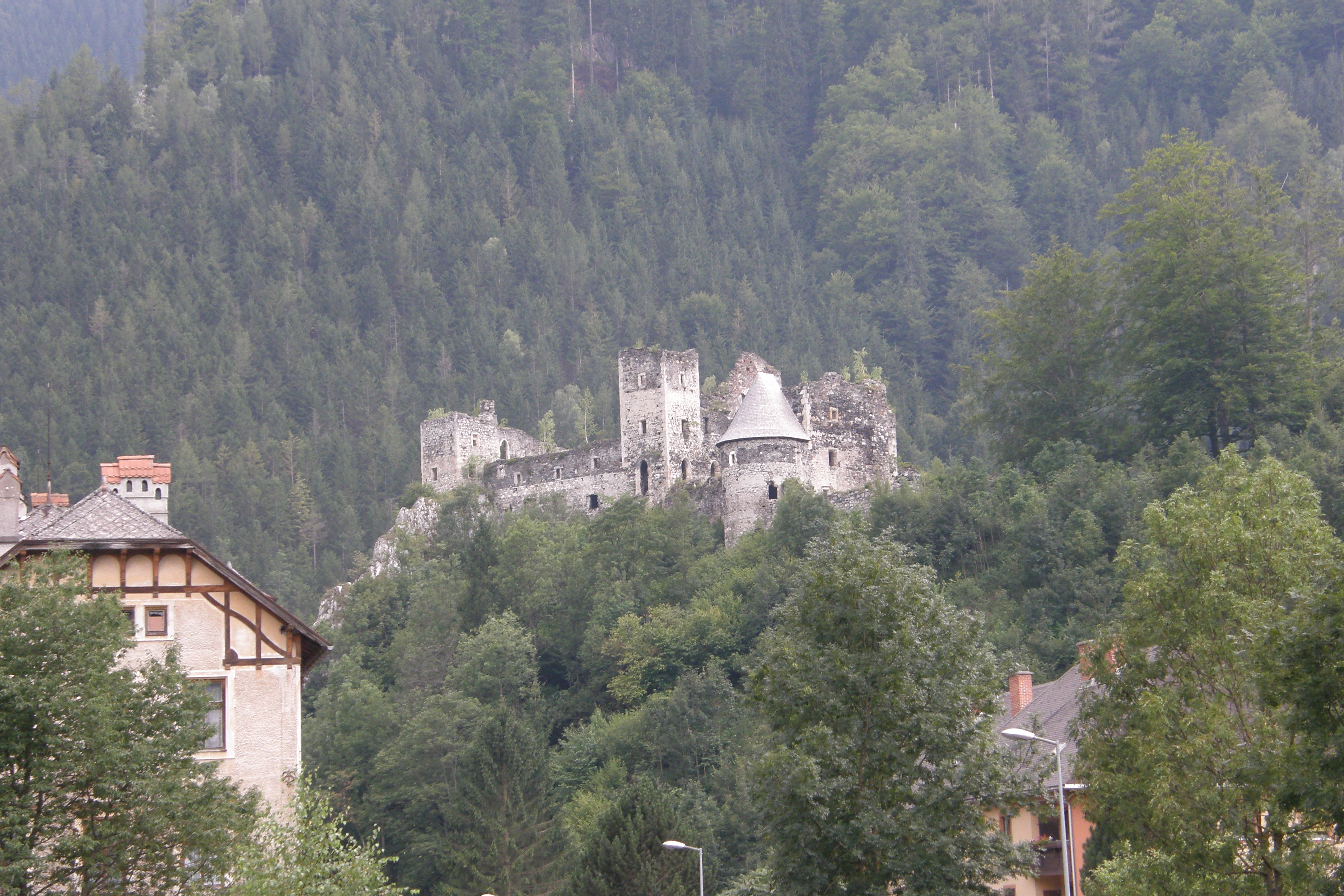 Die Ruine Schachenstein von Nordost gesehen